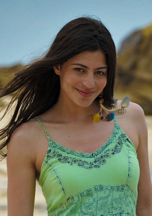 Atriz brasileira Carol Castro